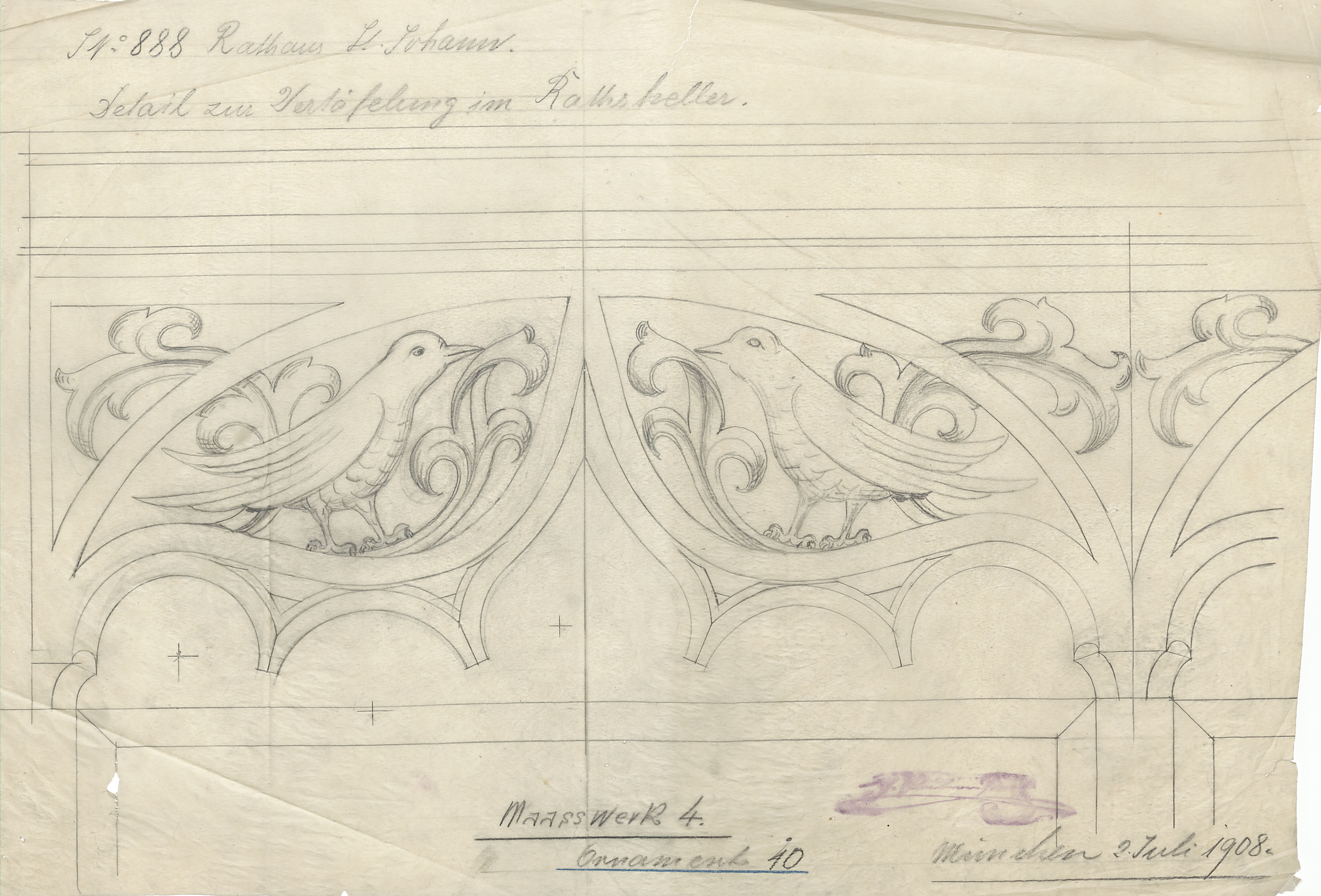 Rathaus St. Johann, Georg von Hauberrissers Entwurf zur Vertäfelung des Ratskellers (1908)